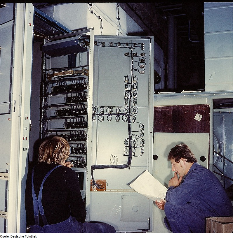 Original image description from the Deutsche Fotothek Elektromonteur, Brauerei